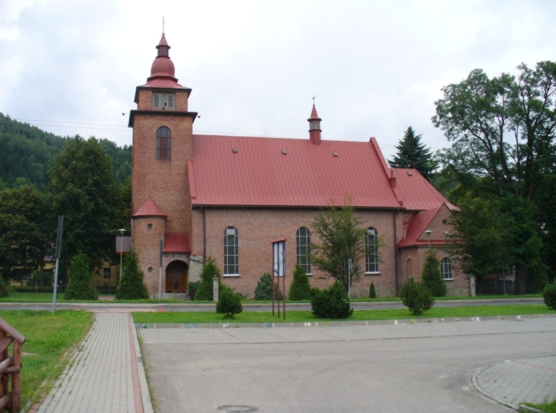 Skawica - kościół pw. Matki Bożej Częstochowskiej